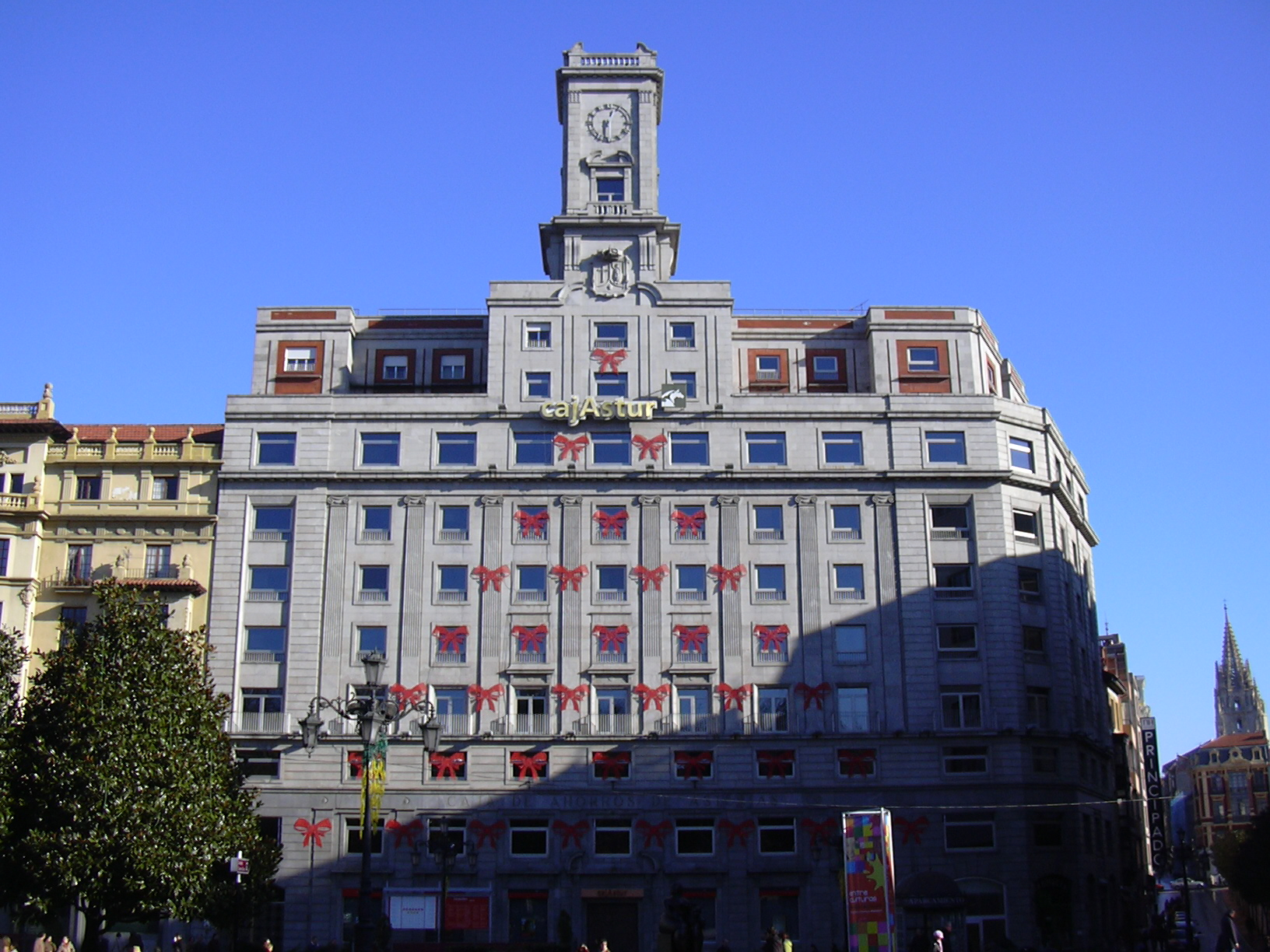 Edifício do banco CajAstur na cidade espanhola de Oviedo